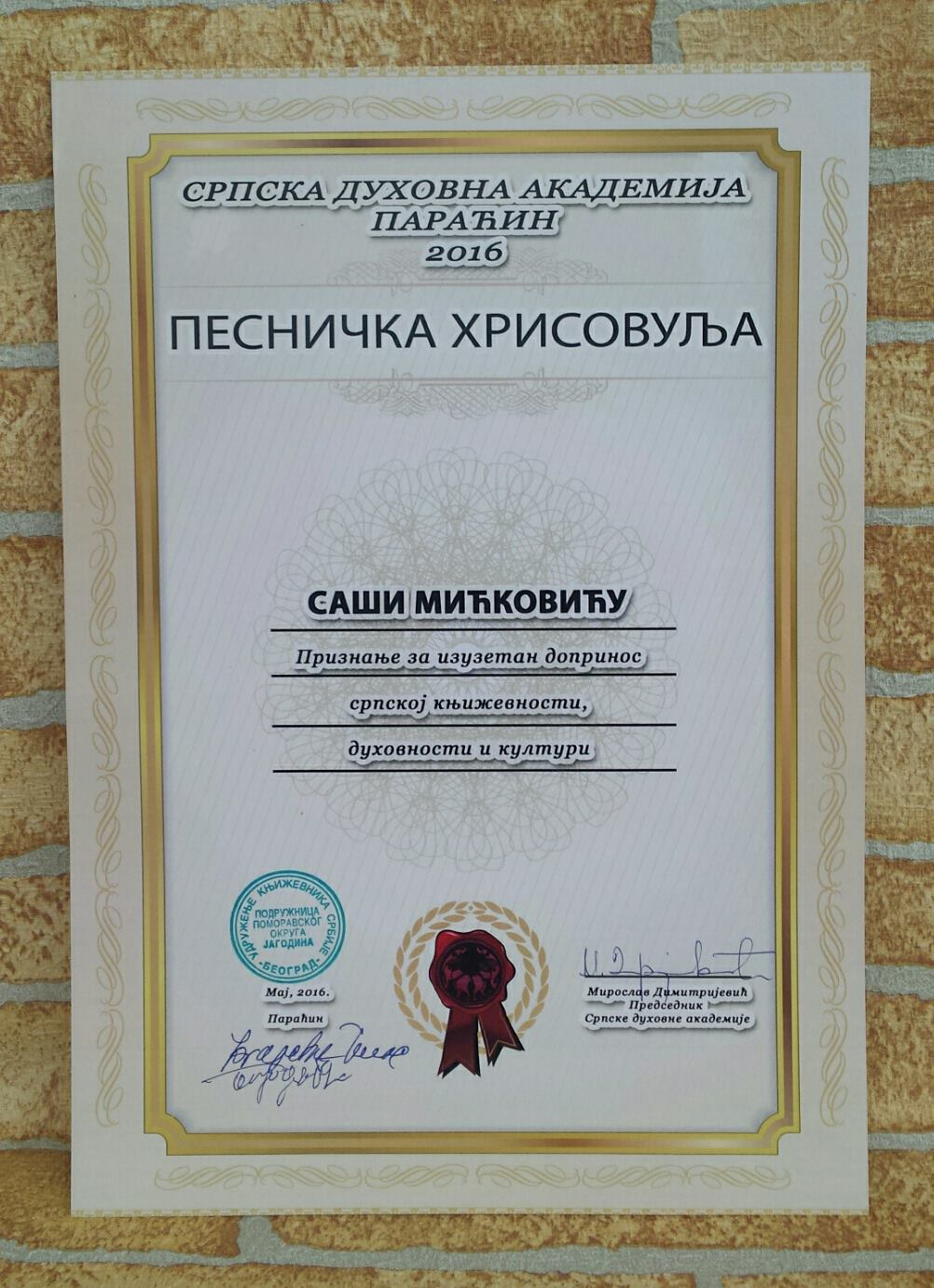 Priznanje Saši Mićkoviću